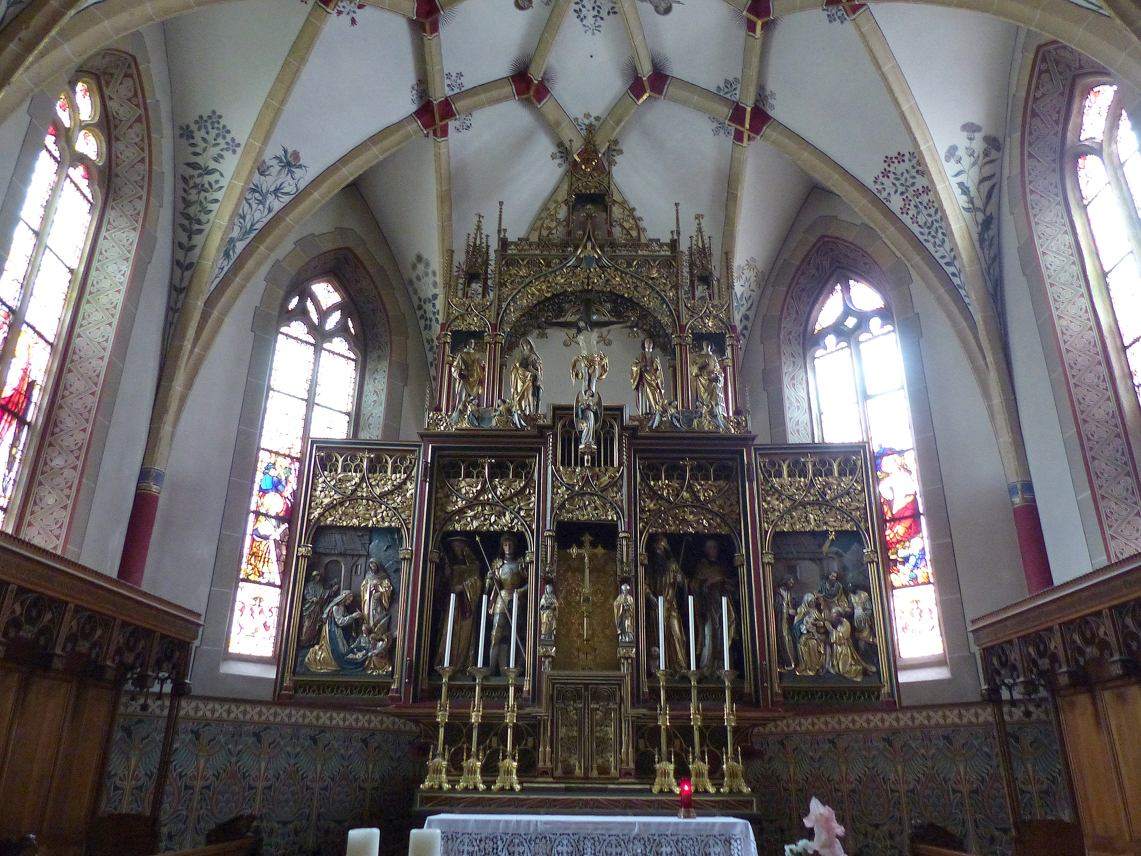 Poschiavo- Graubünden - San Vittorio Mauro - Innenaufnahme